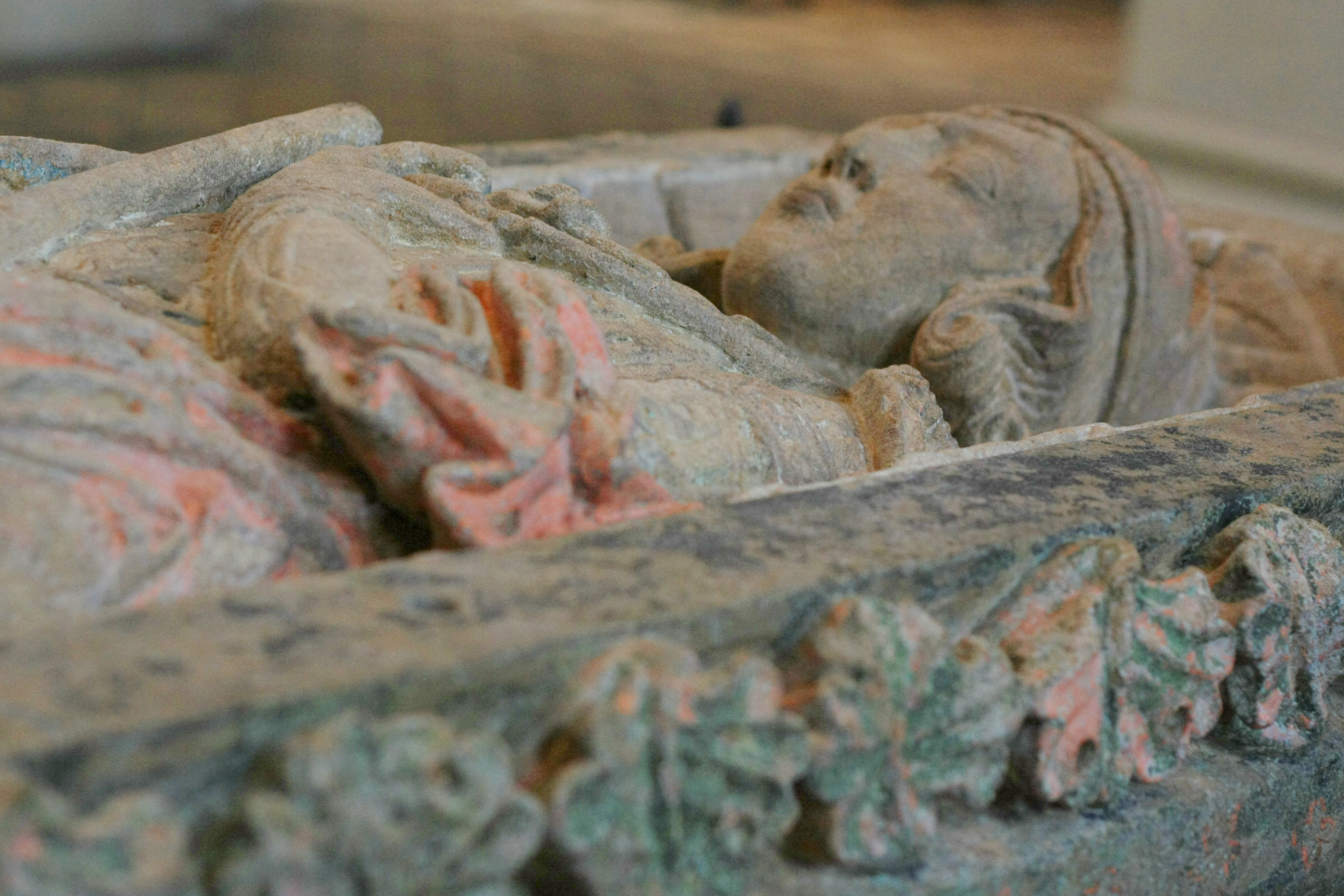 Grabmal des Konrad Kurzbold im Dom zu Limburg, Liegefigur